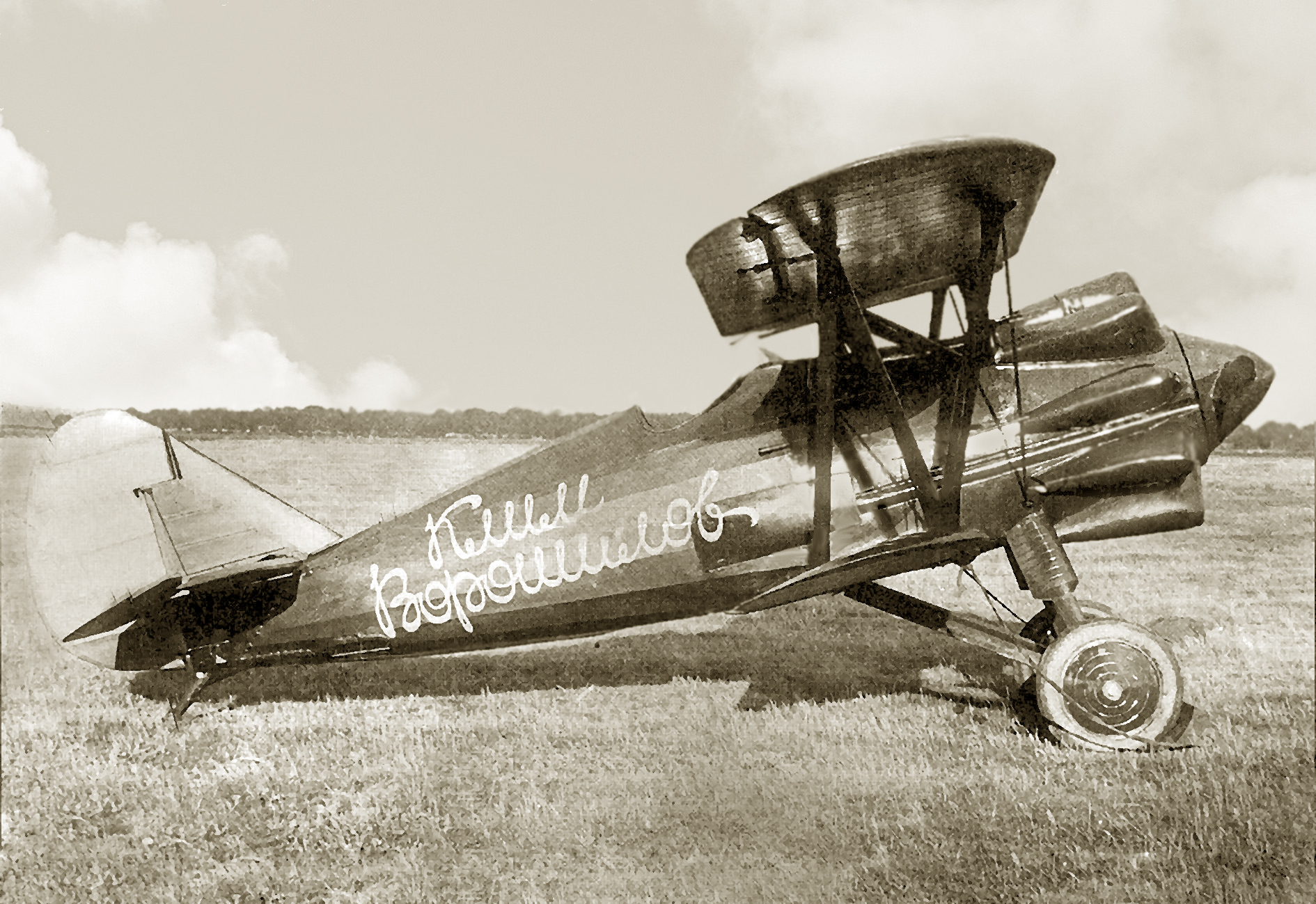 И-5 третий прототип "Клим Ворошилов"